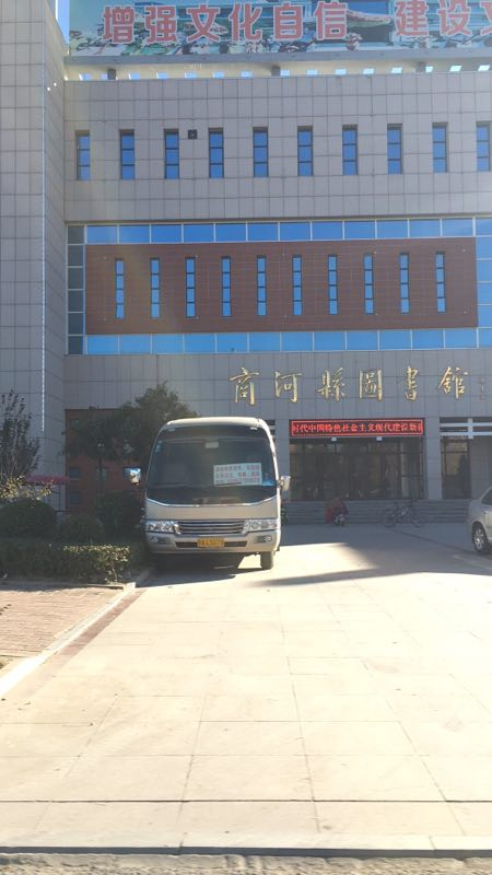 商河图书馆